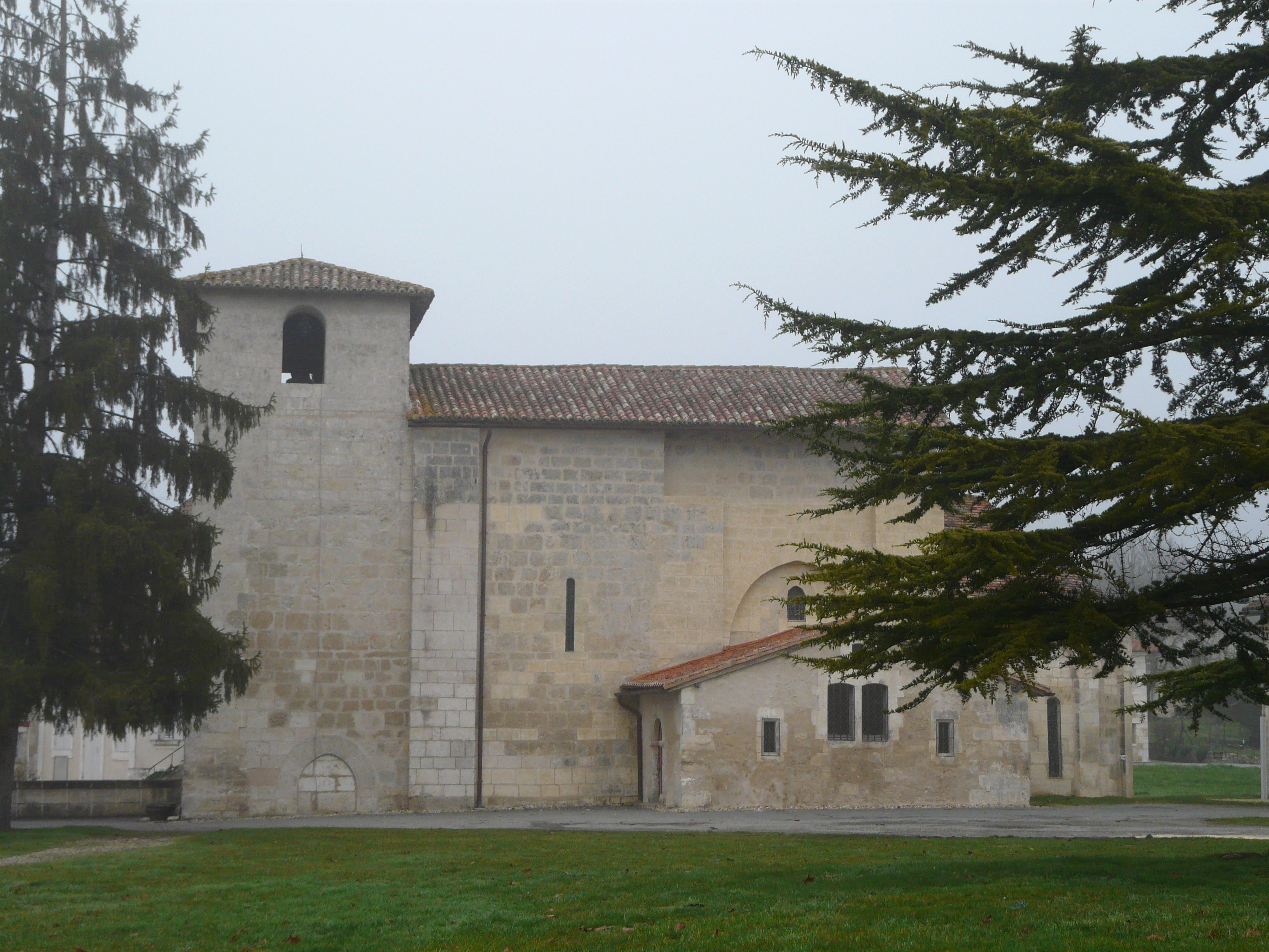 Le côté sud de l'église Saint-Saturnin de Coutures, Dordogne, France.